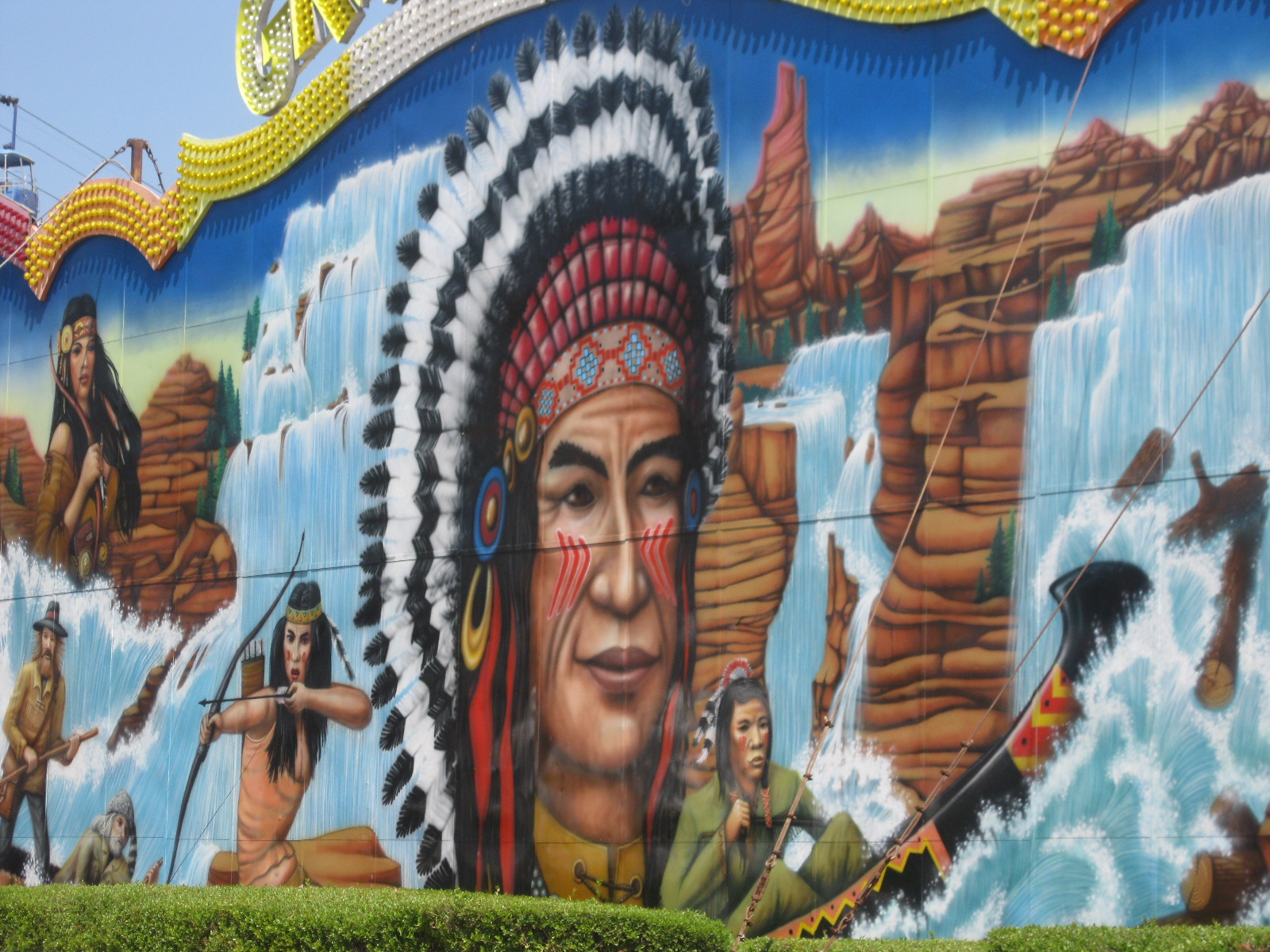 תפאורת מתקן ה"גראנד קניון" בסופרלנד